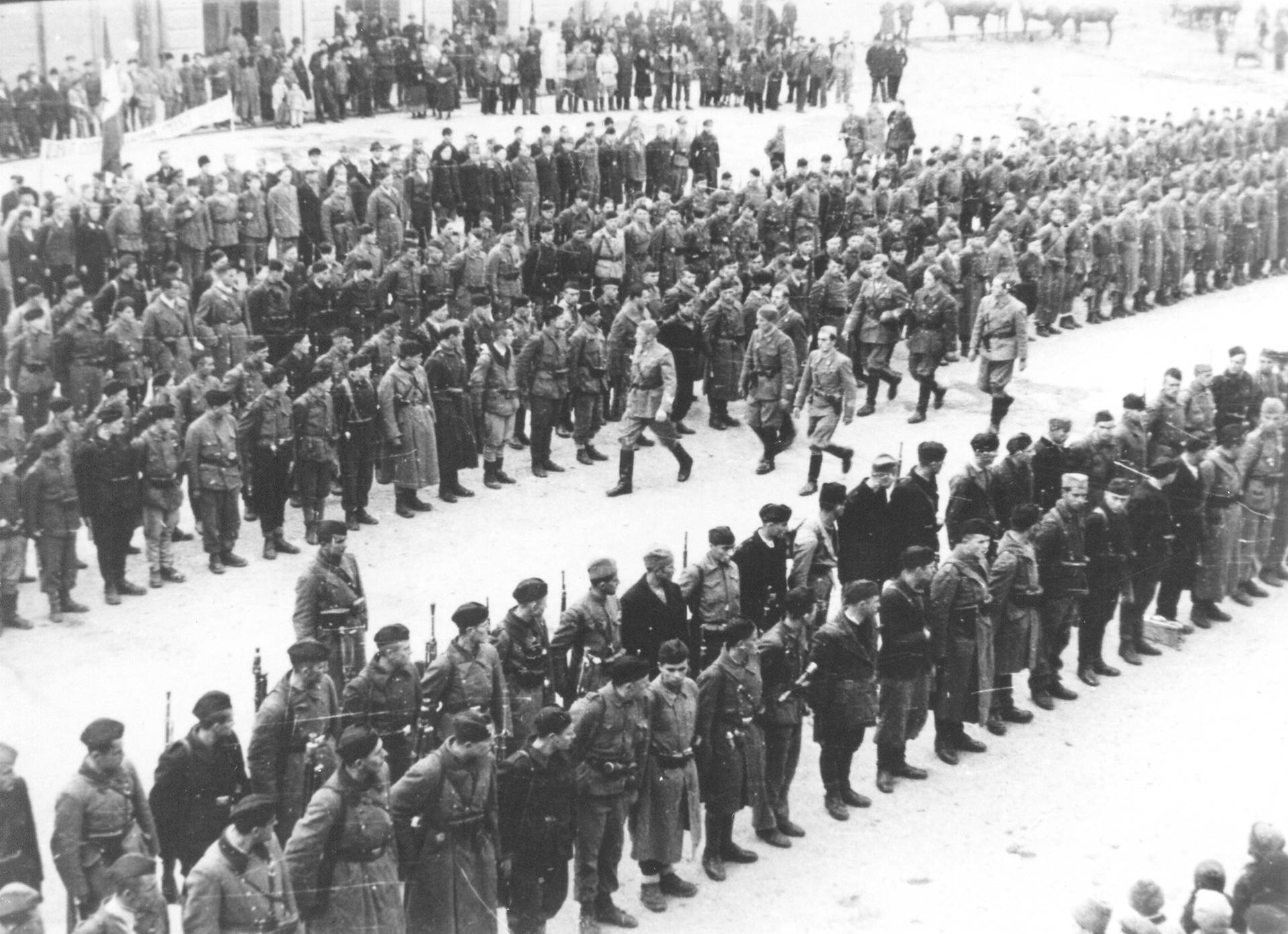 Srpskohrvatski / српскохрватски: Detalj sa smotre I krajiške NOU brigade, pri nailasku članova Štaba brigade ispred 3. bataljona, Vršac, 7. novembra 1944.